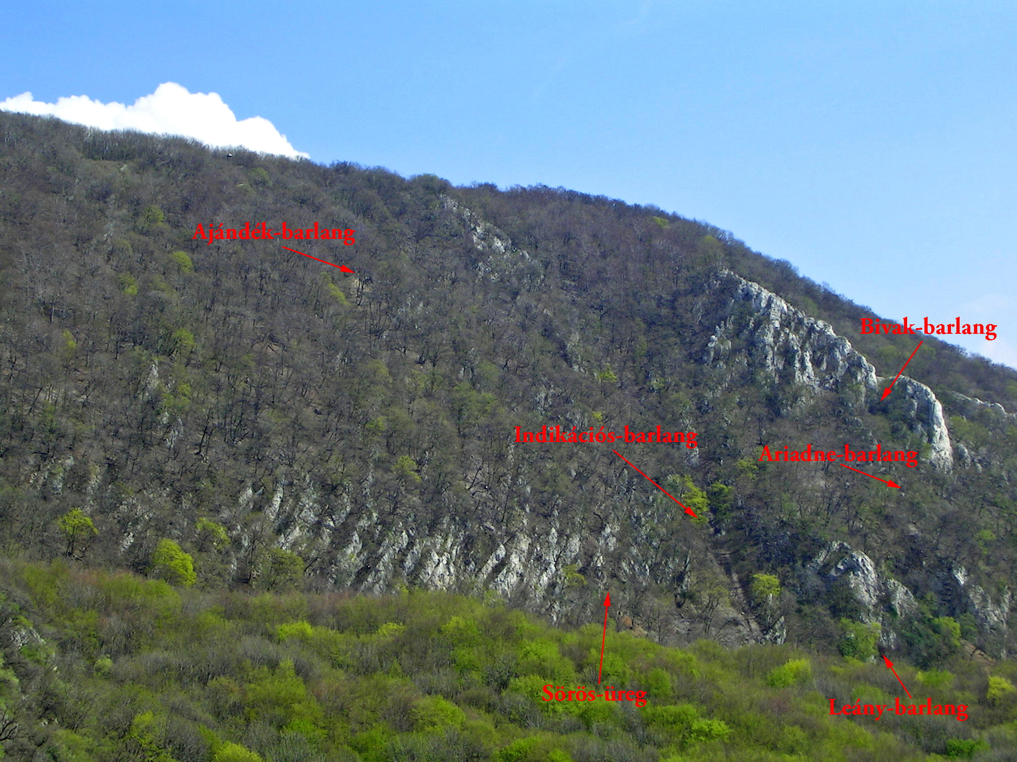 Csévi-szirtek barlangbejáratokkal, Pilis